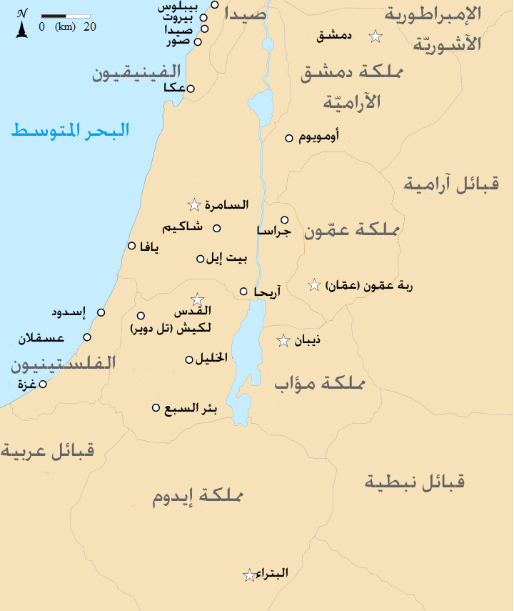 خريطة تاريخية للدول التي كانت موجودة في بلاد الشام حوالي عام 830 ق.م